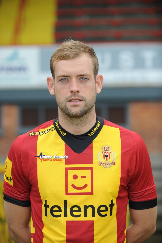 Deens voetballer bij KV Mechelen